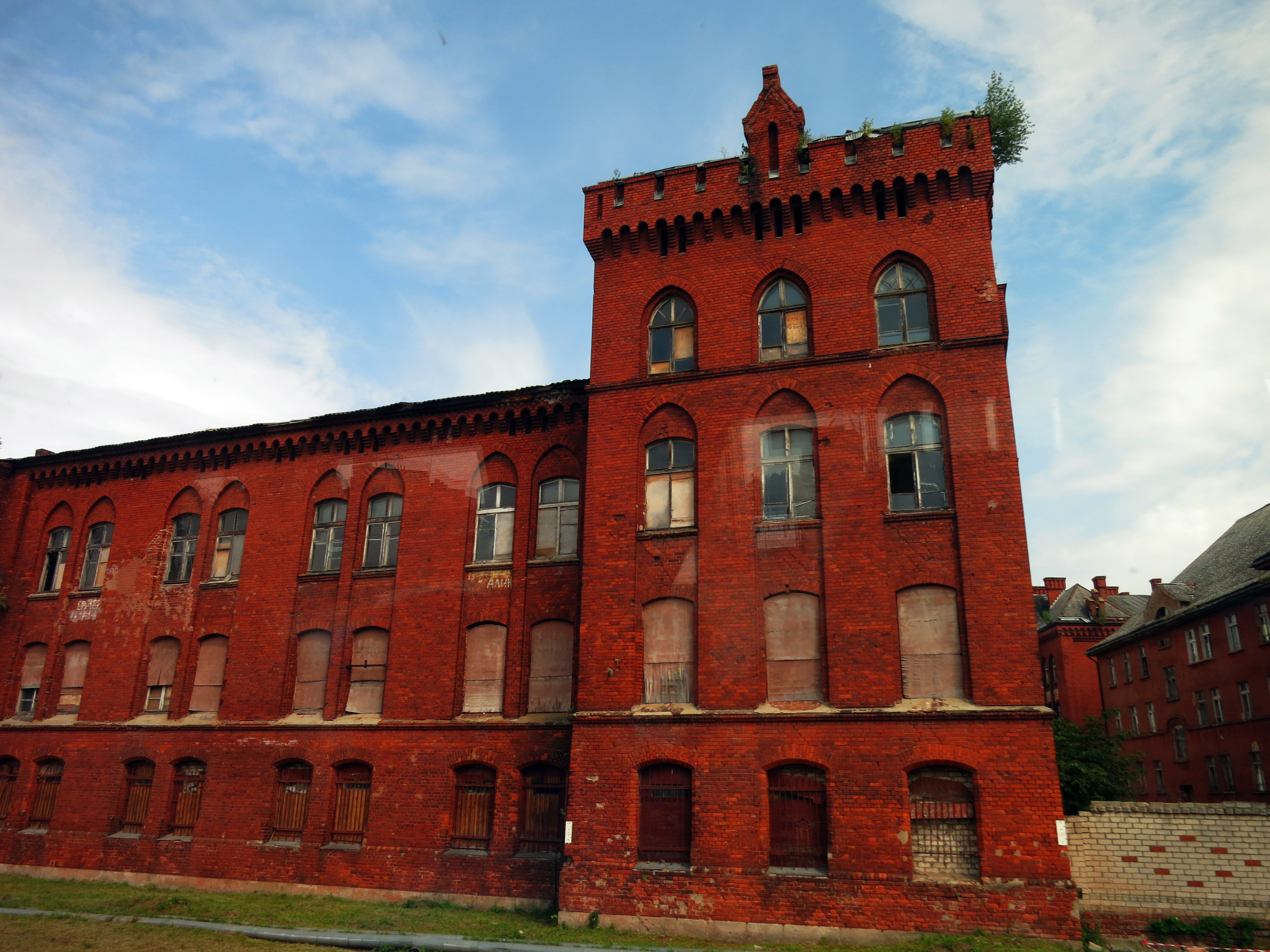 Комплекс зданий уланского полка: улица Московская, 36, Гусев, Гусевский район, Калининградская область